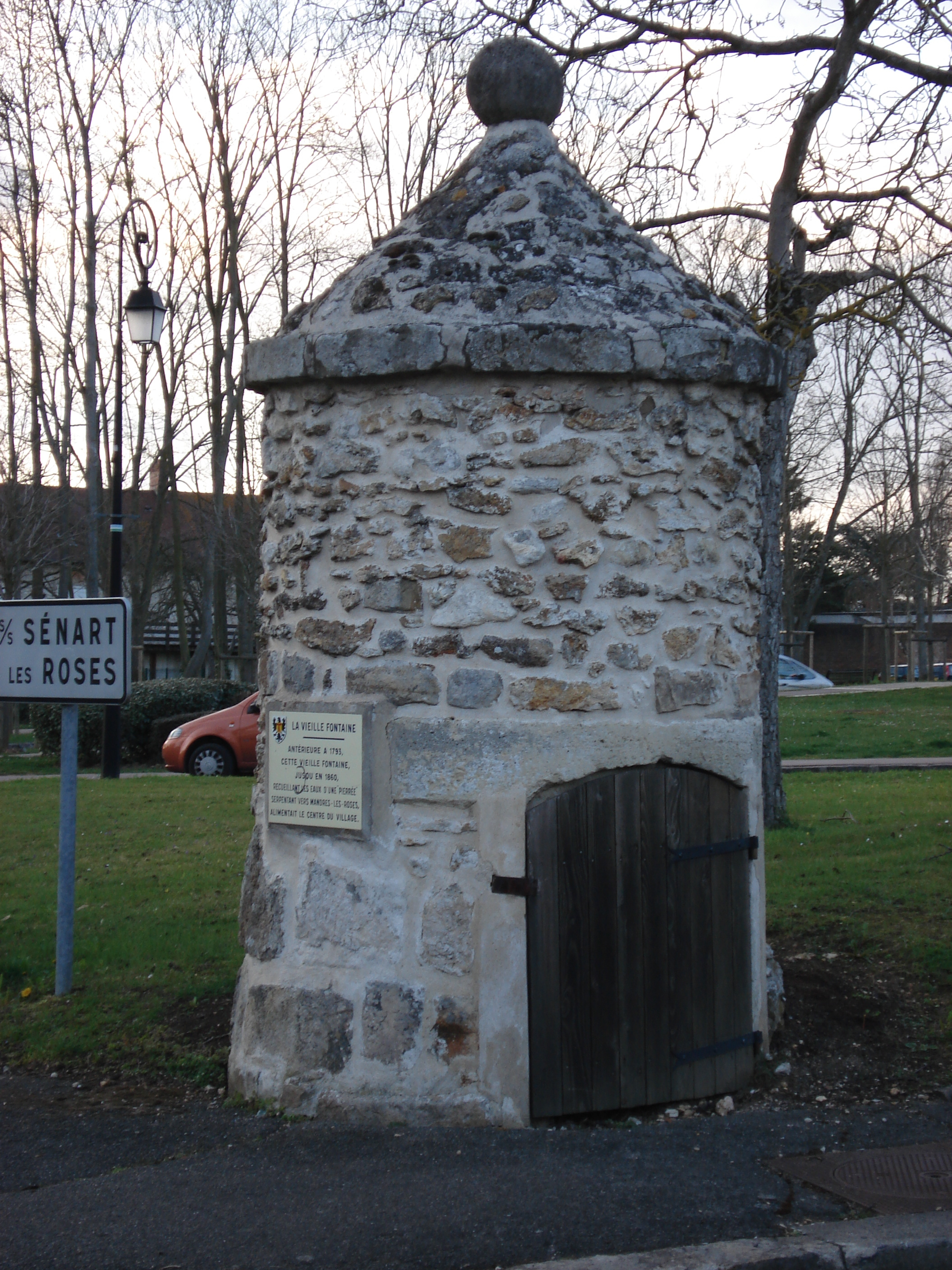 La vieille fontaine de Boussy-Saint-Antoine. Ci-dessous, une retranscription du texte de l'écriteau que l'on peut voir sur la photo : "La vieille fontaine Antérieur à 1793, cette vieille fontaine, jusqu'en 1860, receuillant les eaux d'une "pierrée" serpentant vers Mandres-Les-Roses, alimentait le centre du village."